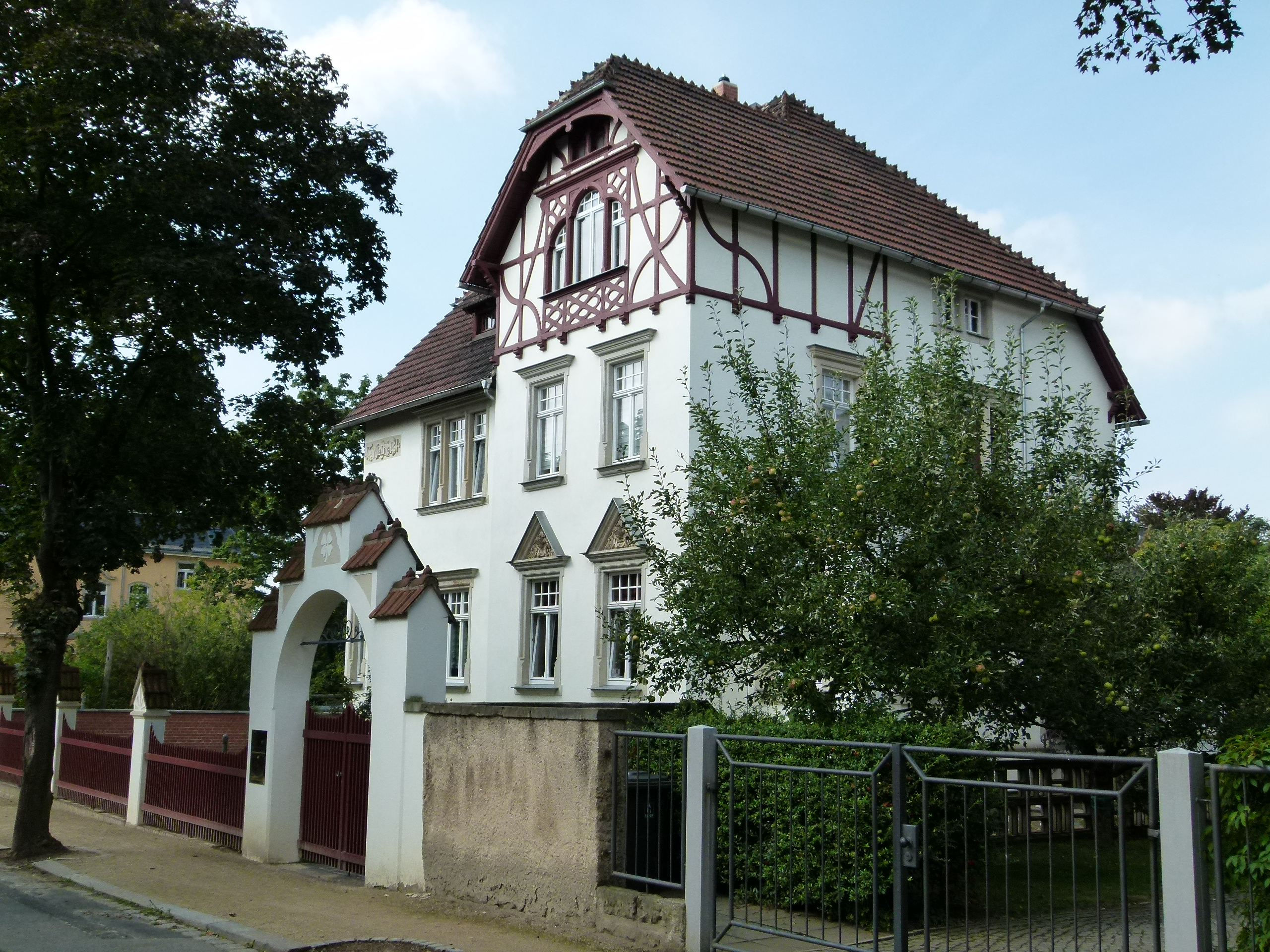 Denkmalgeschütztes Haus, Horst-Viedt-Straße 3, Radebeul, Sachsen